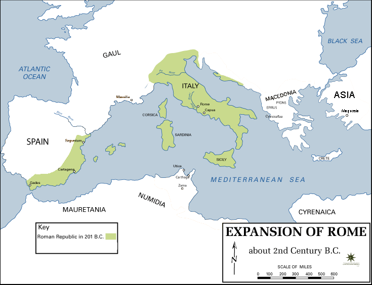 כיבושי רומא במאה ה-2